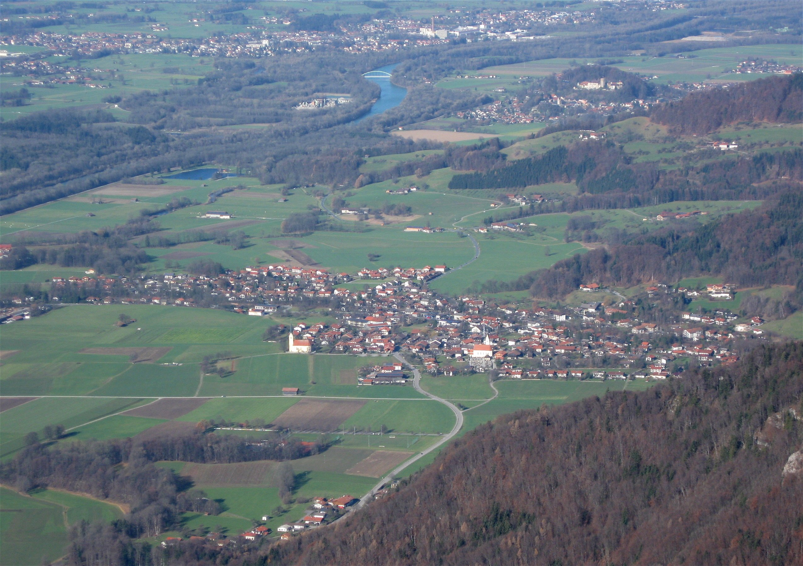 Nußdorf a.Inn vom Kranzhorn aus gesehen